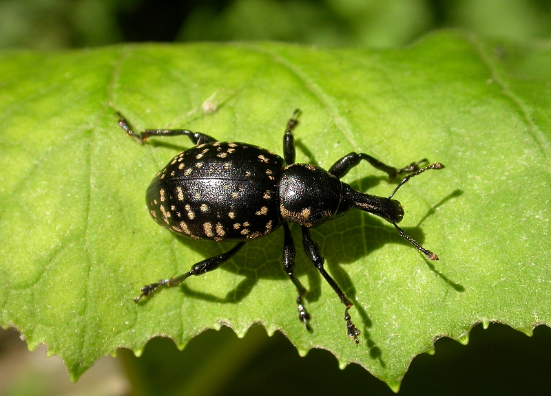 Liparus glabrirostris auf Pestwurz, Wutachschlucht, Schwarzwald, Deutschland, Germany